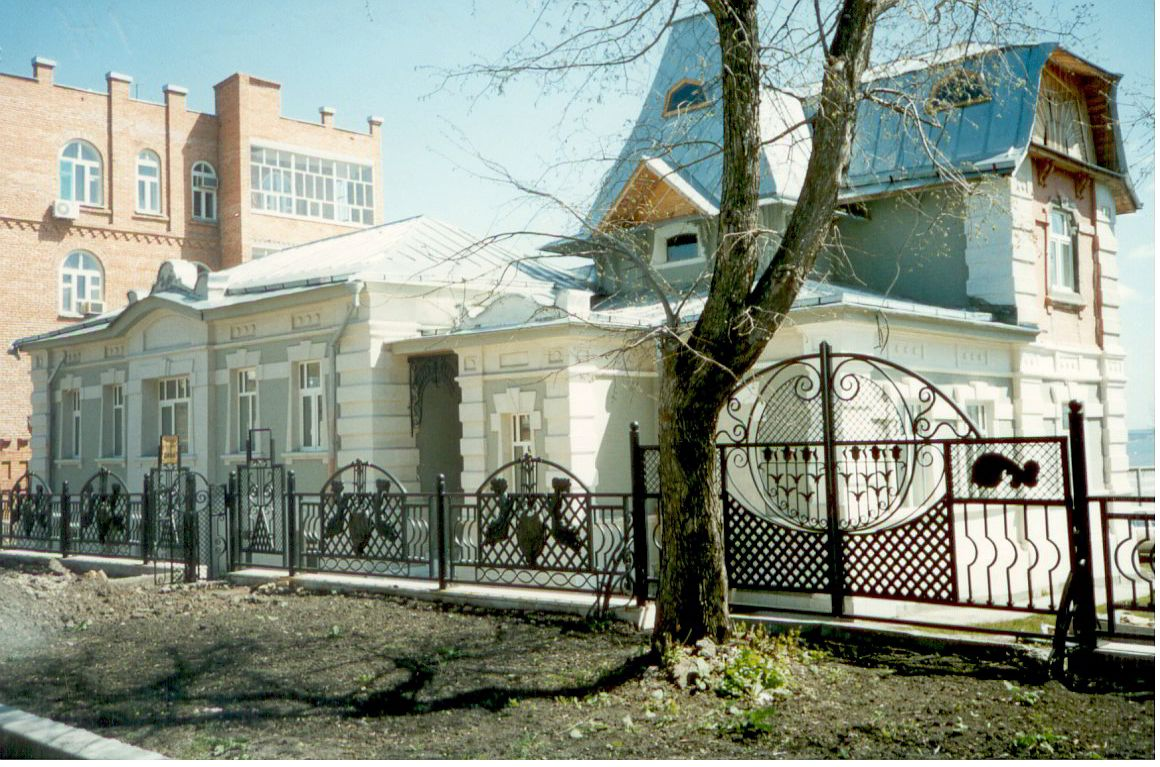 Симбирск. Дом врача П.С. Петрова. Архитектор А.А. Шодэ 1911 г.